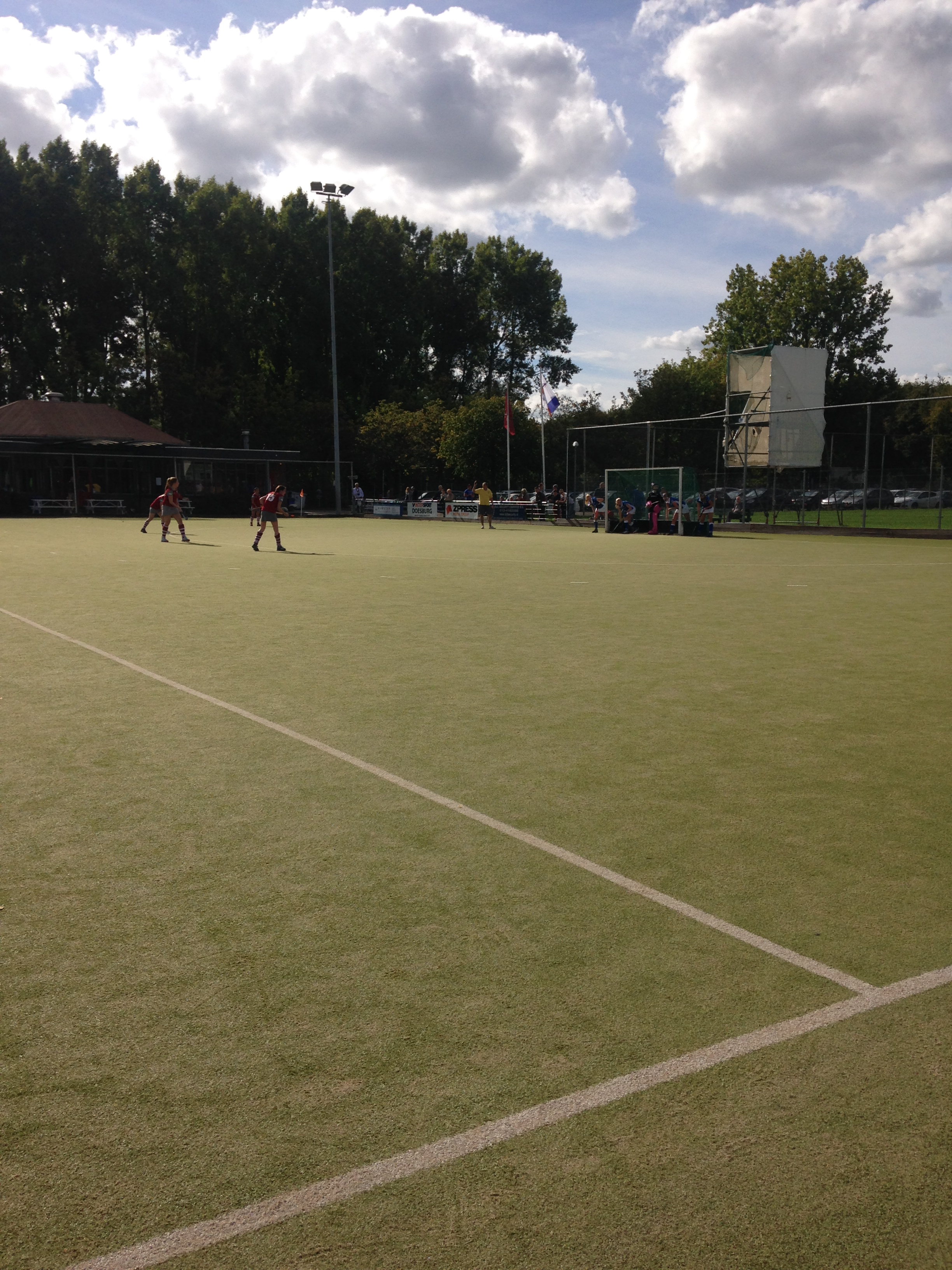 Zicht op veld met clubhuis tijdens wedstrijd van dames 1